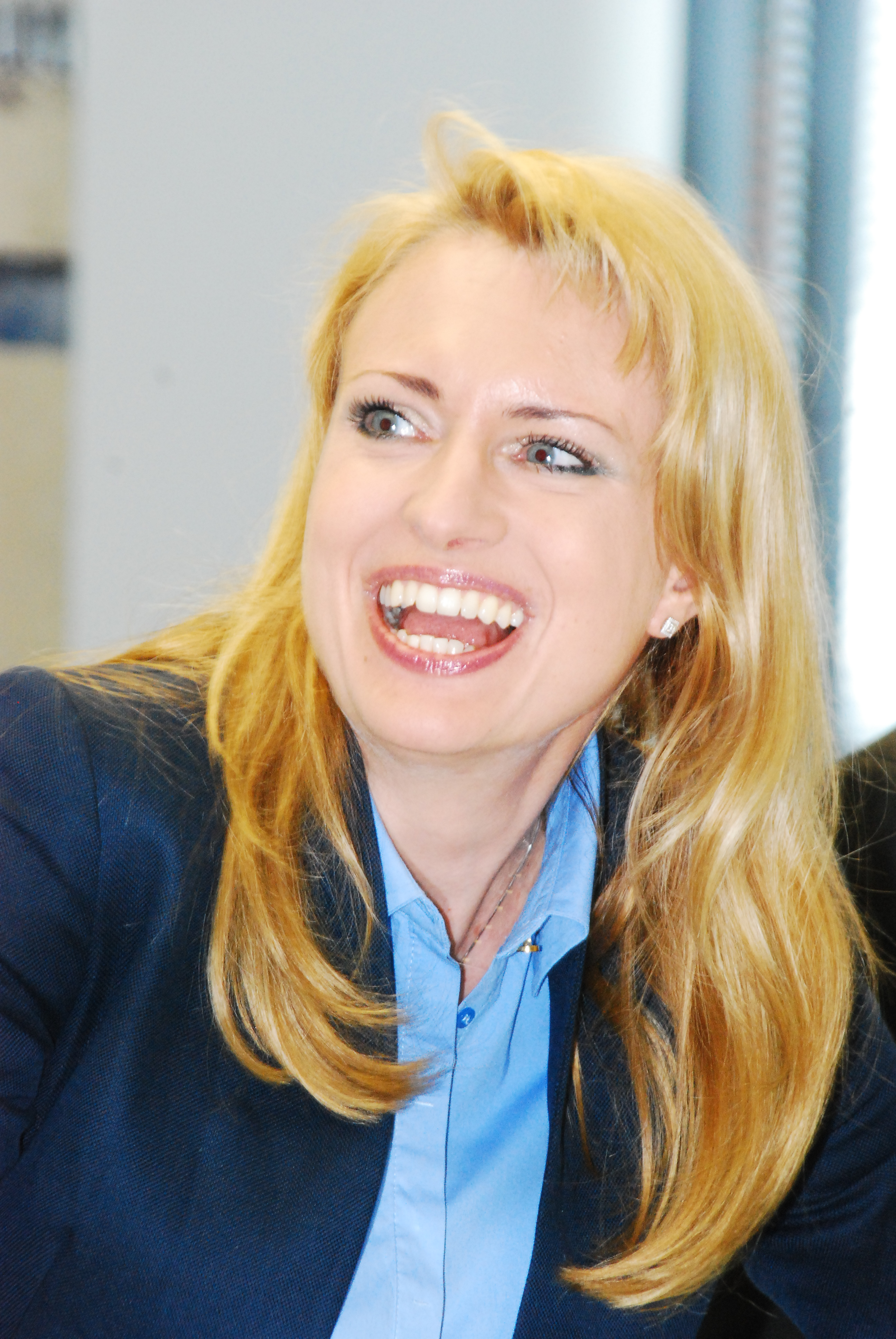 Aleksandra Izdebska, Gründerin der Firma DiTech in Wien-Brigittenau.